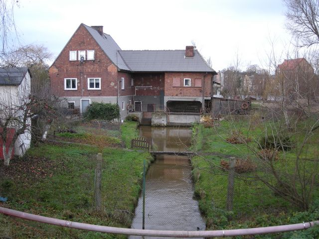 Kanał Rybny, Szczecin